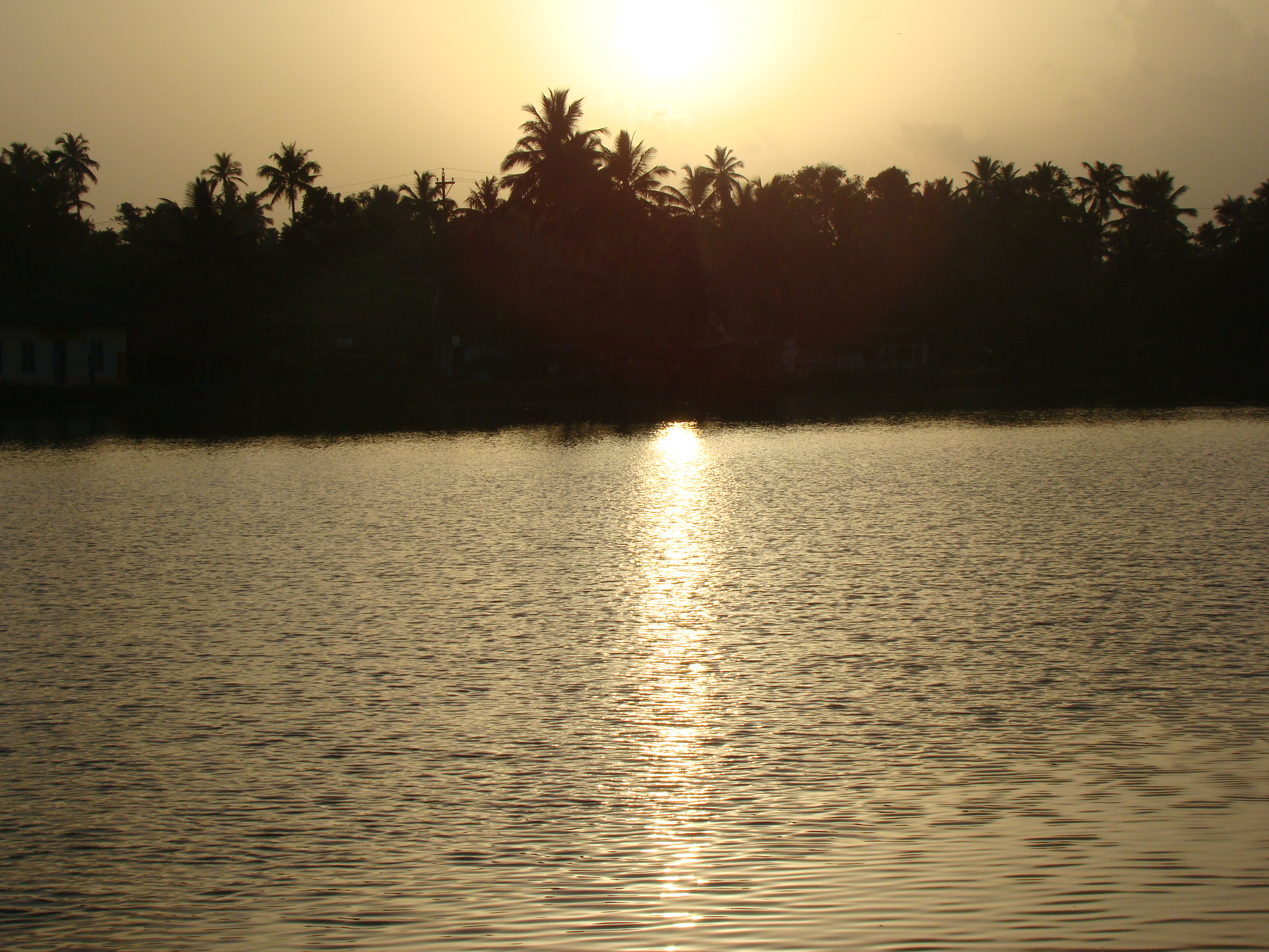 വേമ്പനാട്ട് കായലിലെ സൂര്യോദയം